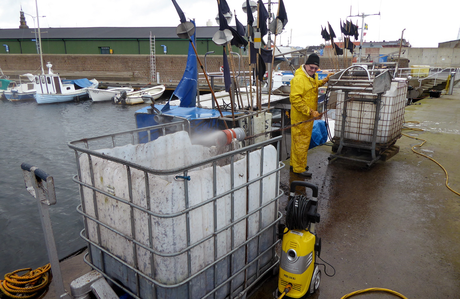 En fiskare rengör sitt nätt med högtryckstvätt i Ystads småbåtshamn 7okt 2017.